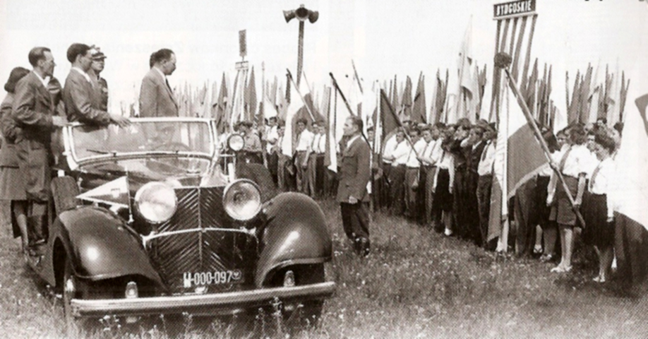 Za źródłem: Prezydent B. Bierut na Krajowym Zlocie ZWM, 21 - 22 VII 1946 r. Fot. Zbiory CA KC PZPR.